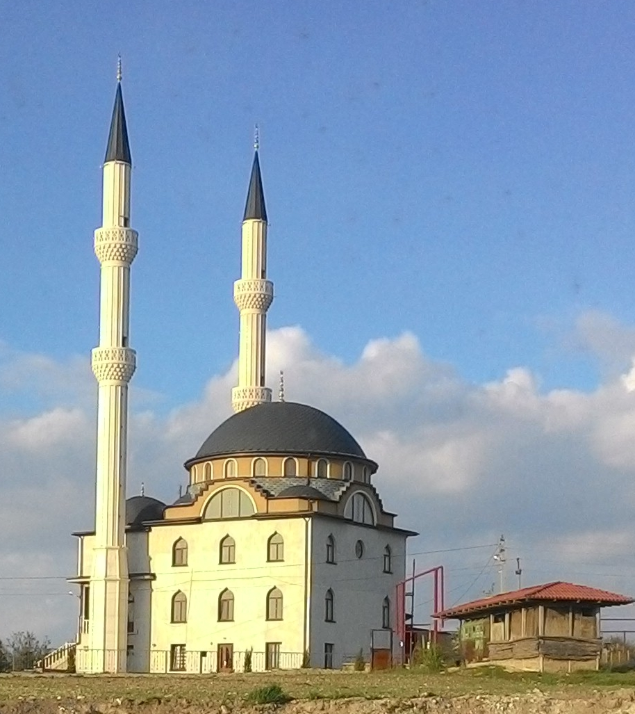 Мечеть Къадыр-Джами в с. Левадки, Крым